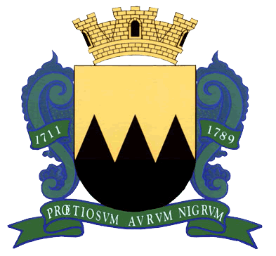 Coat of arms of Ouro Preto city, in Minas Gerais State, Brazil. All the images of Brazilian states or cities flags and coat of arms (official symbols) are in public domain. Brasão da cidade de Ouro Preto no estado de Minas Gerais, Brasil. Todas as imagens de bandeiras de estados ou cidades brasileiros e brasões (símbolos oficiais) estão em domínio público.